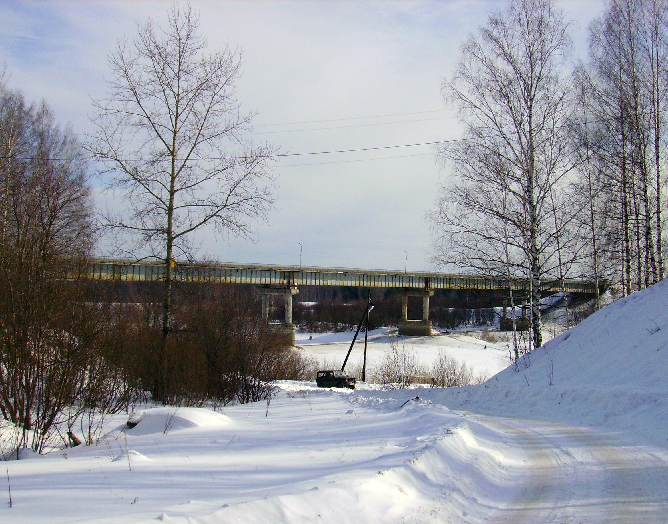 Ветлуга. Автодорожный мост через реку Ветлугу.